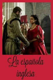 Es una foto de la película de La inglesa española